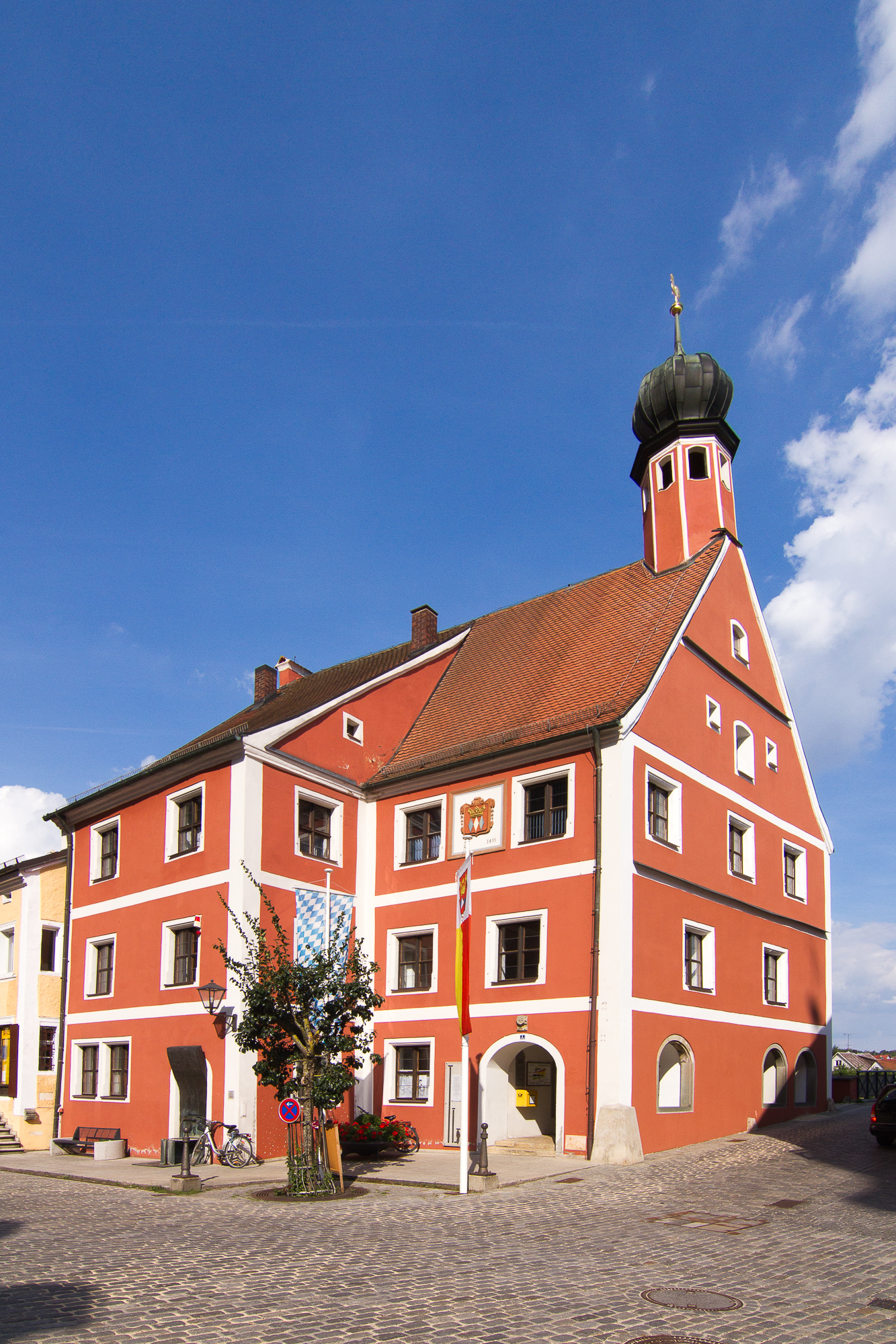 Altes Rathaus; dreigeschossiger und traufständiger Satteldachbau mit Dachreiter und Zwiebelhaube, bez. 1603